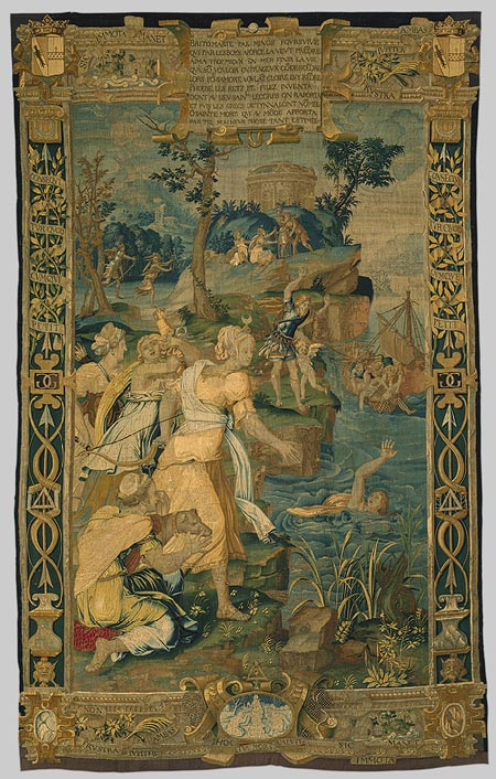 dessin de Britomartis